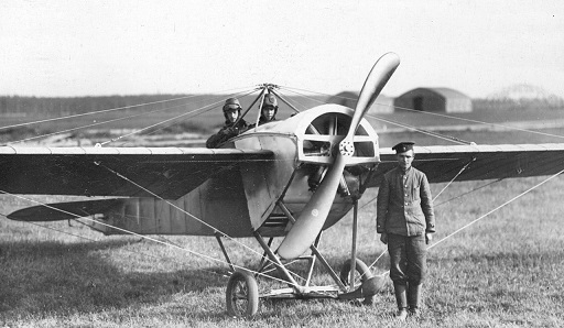 Россия. Самолет Ньюпор-IV моск.завода Дукс(Dux) c мотором Gnome 70л.с. (Дукс N3). 1912г.